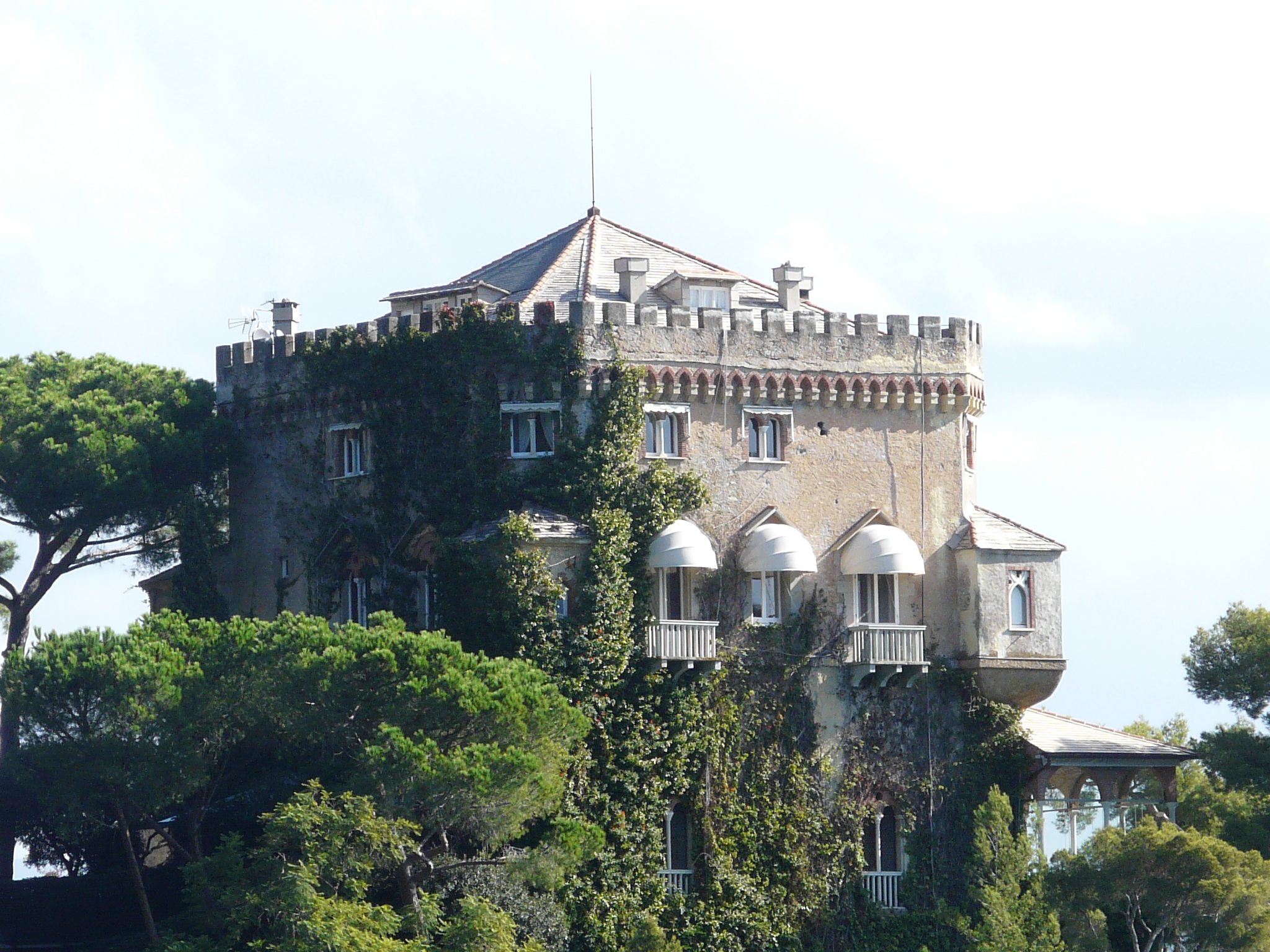 Castello di Paraggi, Santa Margherita Ligure, Liguria, Italia